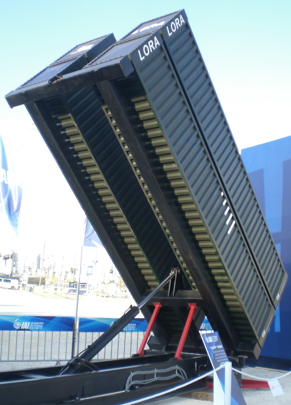 LORA missile launcher